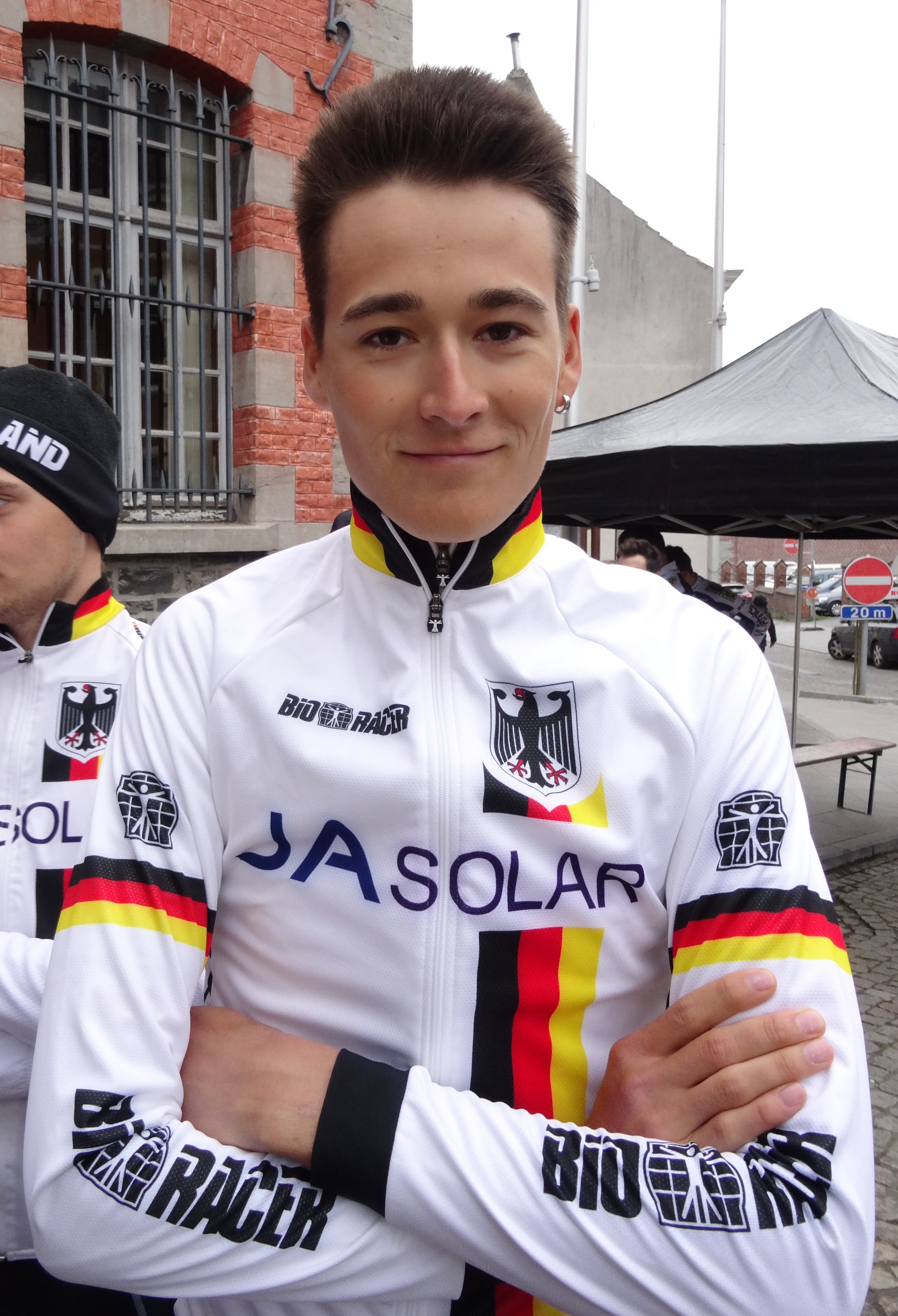 Triptyque des Monts et Châteaux 2014, étape 1, 4 avril 2014, départ d'Antoing. Depicted person: Silvio Herklotz Depicted team: Équipe nationale d'Allemagne espoirs The creation of these files was made possible thanks to the organizers of the Triptyque des Monts et Châteaux 2014 English | français | +/−